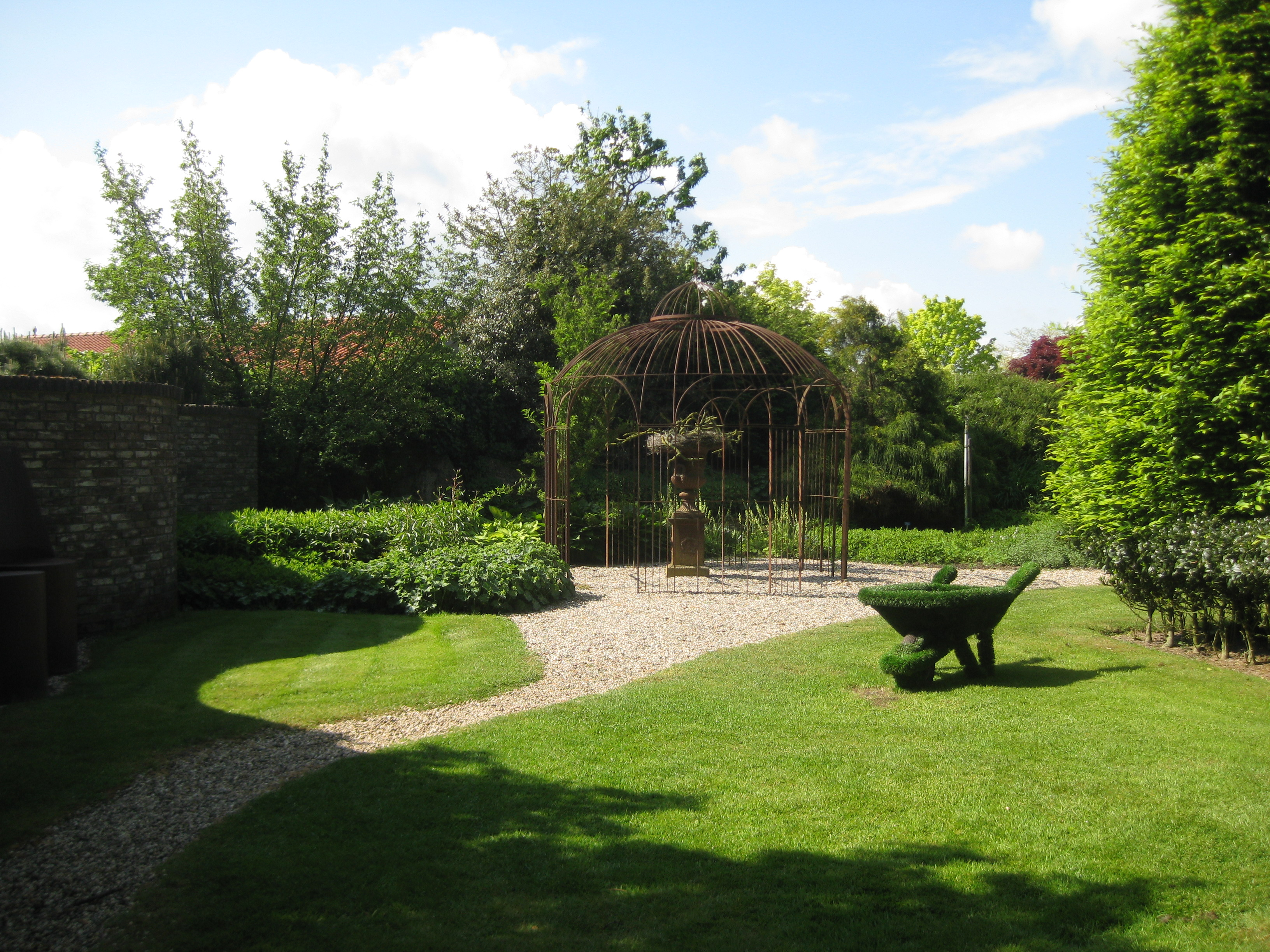 Modeltuin bij De Tuinen van Appeltern in Gelderland